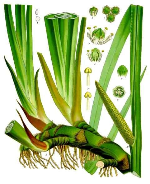 Kalmus. A B Theile der Pflanze in natürl. Grösse; 1 Theil der Kolbenoberfläche, vergrössert; 2 einzelne Blüthe, desgl.; 3 dieselbe stärker vergrössert; 4 Stempel, desgl.; 5 Blüthe im Längsschnitt, desgl.; 6 Stempel im Querschnitt, desgl.; 7 Staubgefässe, desgl.; 8 Pollenkörner, desgl.